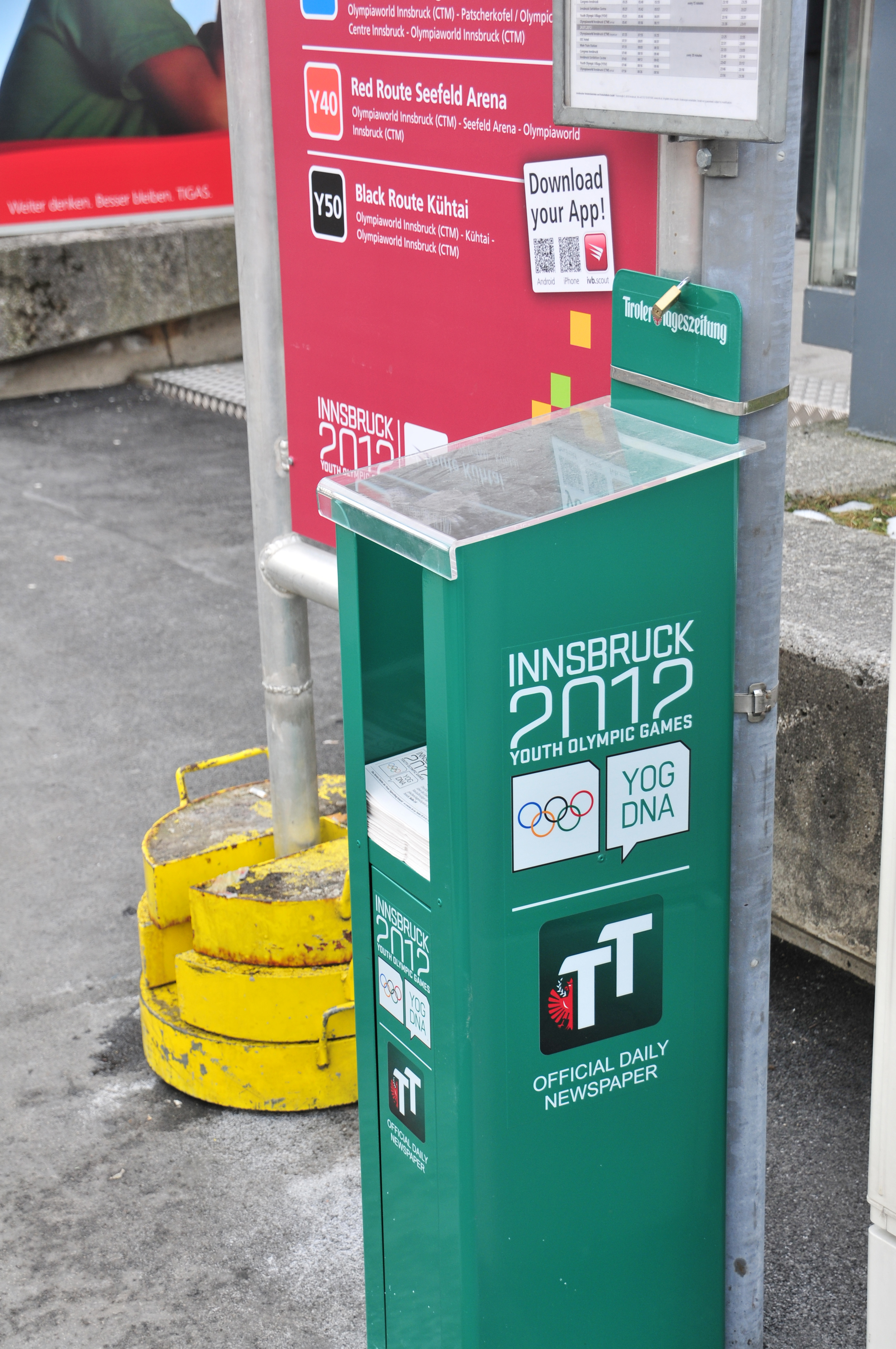 1. Jugendolympiade 2012 Innsbruck Erste Olympische Jugend- Winterspiele 201213. bis 22. Jänner in Innsbruck Dieses Foto wurde durch die Unterstützung von Wikimedia Österreich und die Twoonix Software GmbH ermöglicht.